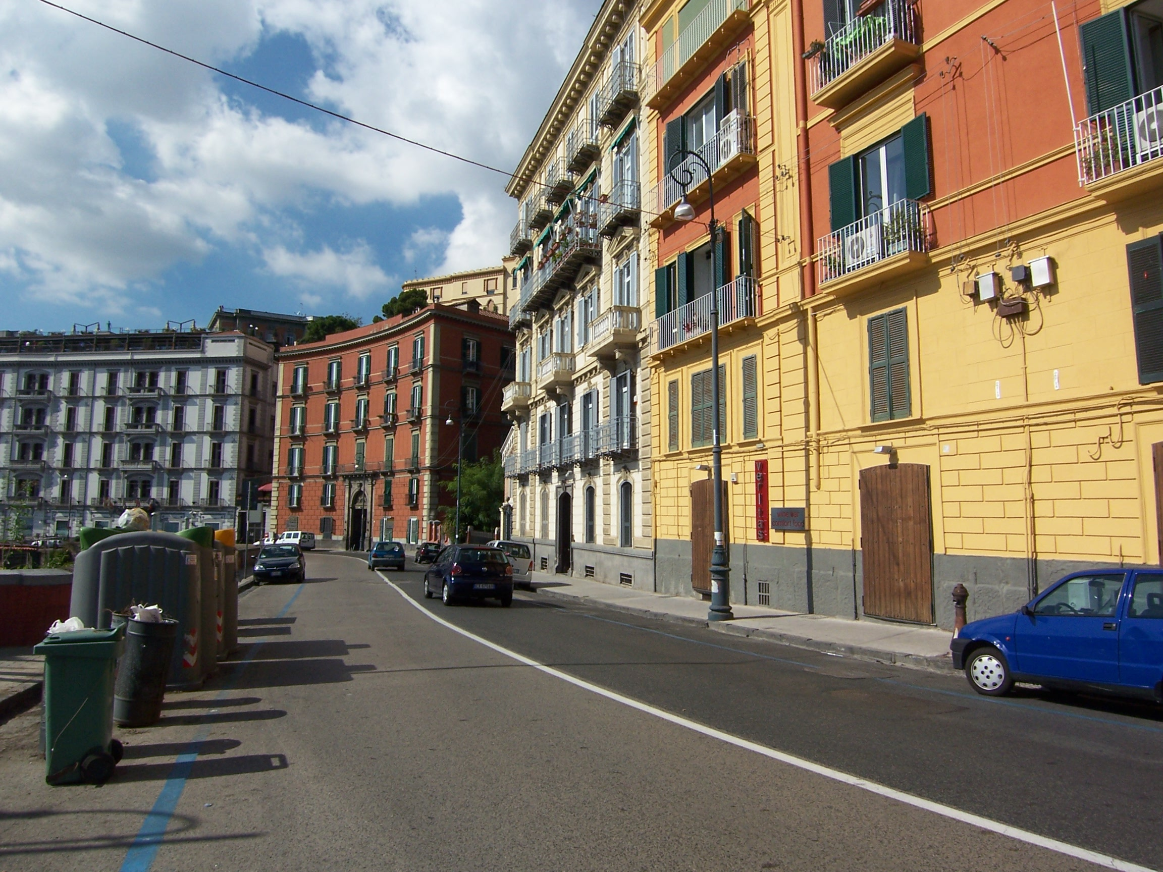 Veduta di Napoli: Corso Vittorio Emanuele.